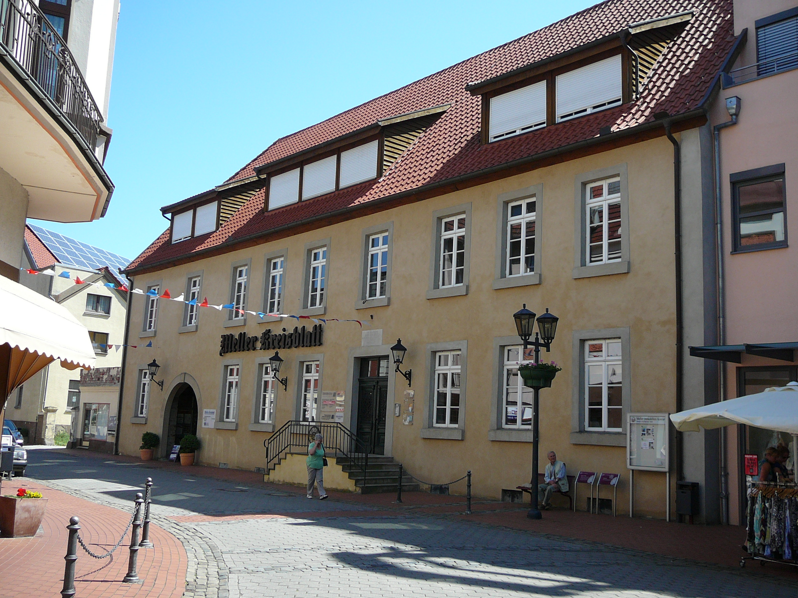 Haus vor Melle, Wohnhaus von Jenny von Voigts, in der Meller Mühlenstraße. Heute ist es der Sitz des Meller Kreisblattes.